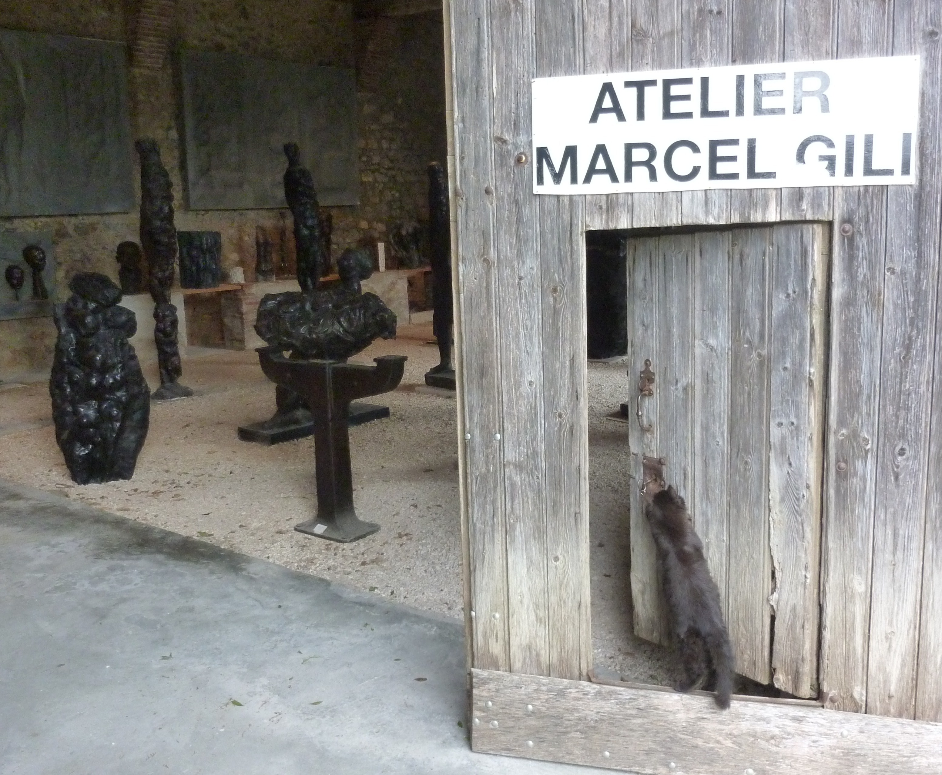 Entrée de l'Atelier-musée de Marcel Gili, sculpteur français